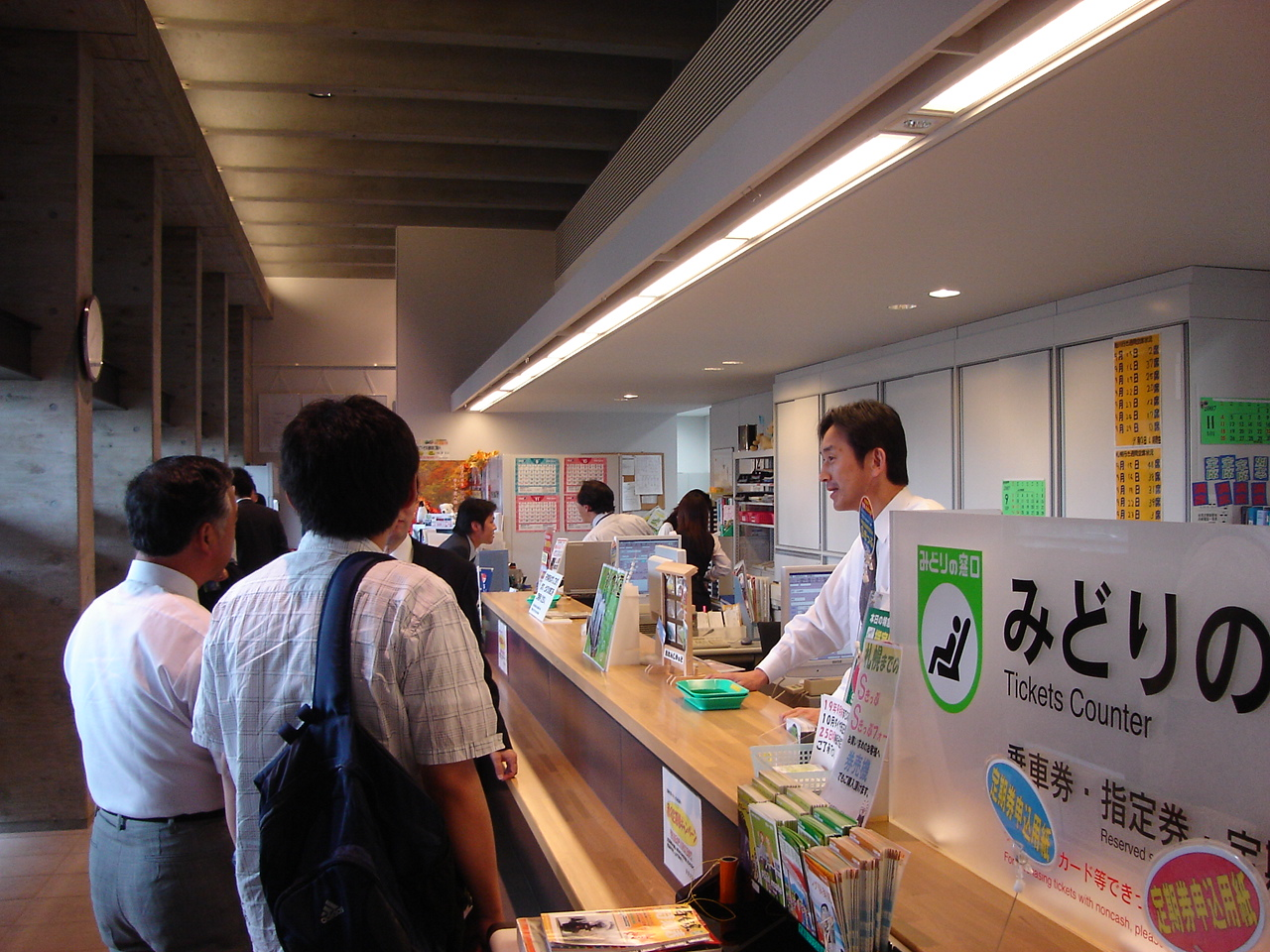 Iwamizawa Station, JR Hokkaido